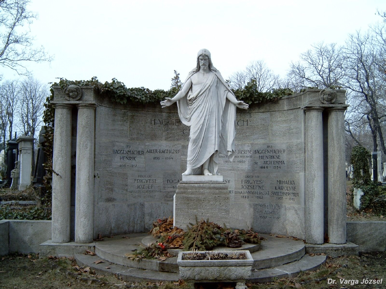 A Haggenmacher-család sírboltja a budapesti Kerepesi úti temetőben. Neoeklektikus, tervező Hickish Rezső, 1919. Damkó József szobra? Kerepesi temető: 18-1-1. (26/1-es parcella. A temető bal fala mellett 312.számon) [szobrász: Szász Gyula] This is a photo of a monument in Hungary. Identifier: 921